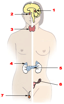 De viktigste endokrine kjertlene. (Mann til venstre. Kvinne til høyre.) 1. Epifysen 2. Hypofysen 3. Skjoldbruskkjertelen 4. Binyrene 5. Bukspyttkjertelen 6. Eggstokkene 7. Testiklene